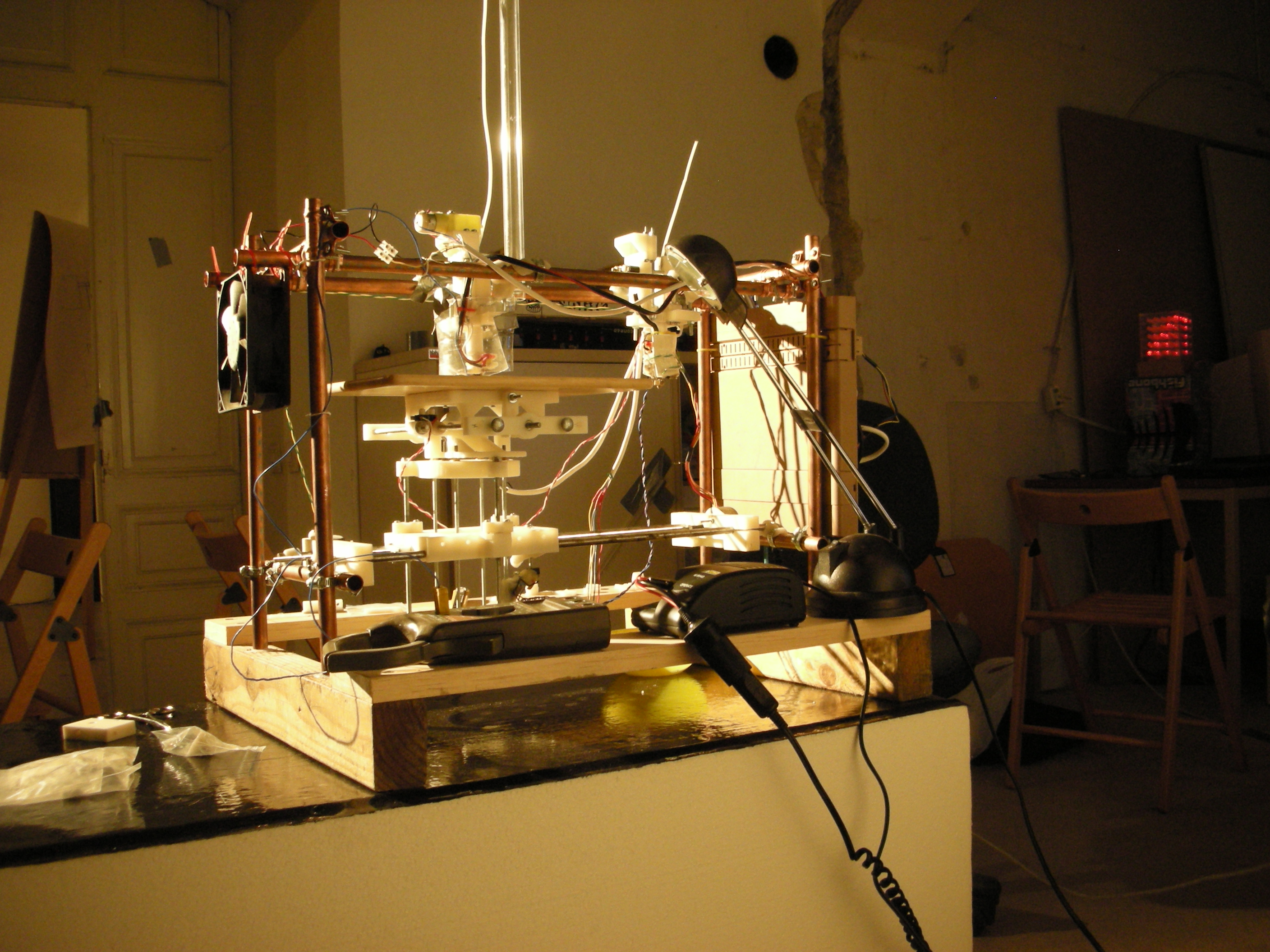 Reprap at Metalab